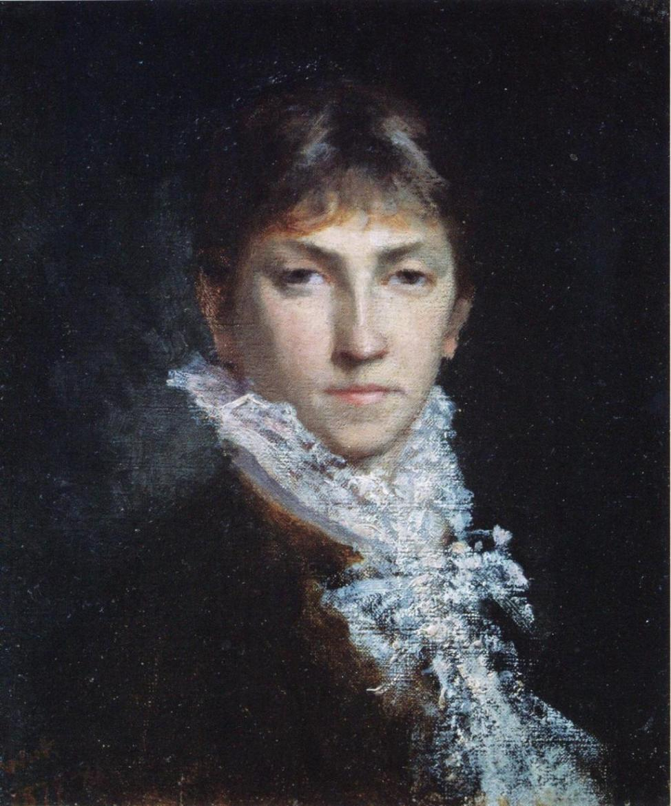 Maria Wiikin omakuva.